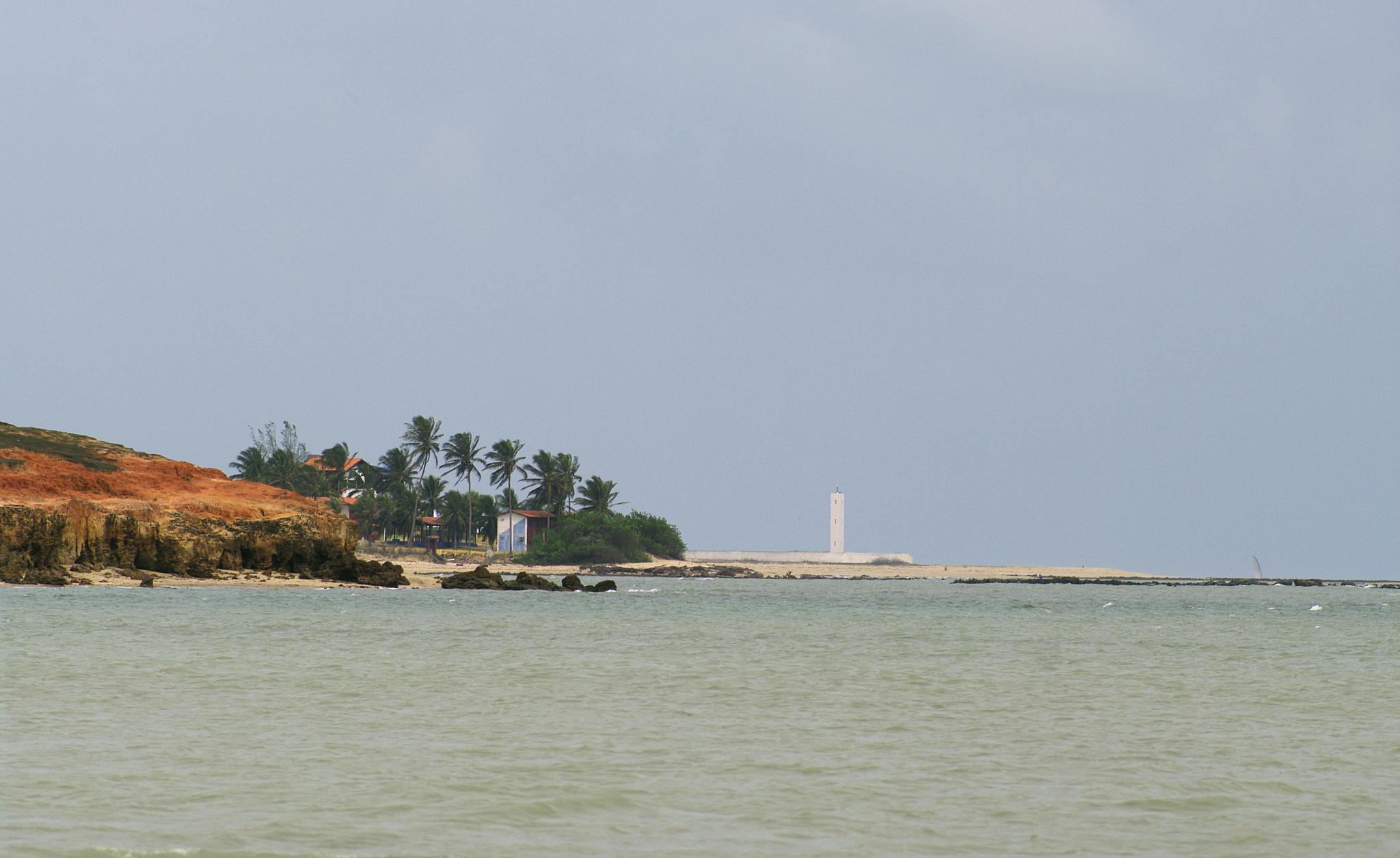 Camocim Lighthouse, Camocim, Ceará, Brazil